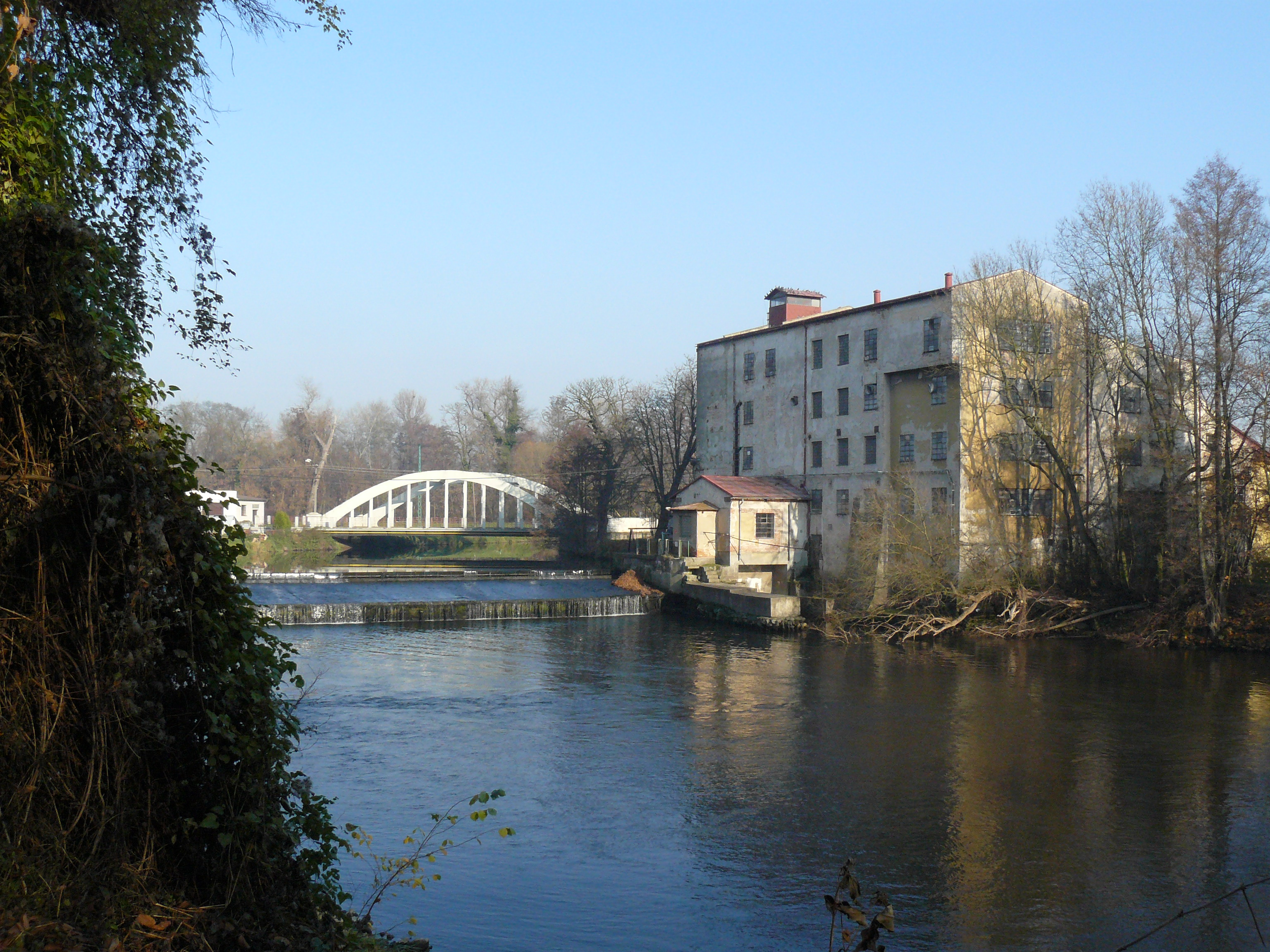 Horky nad Jizerou - mlýn